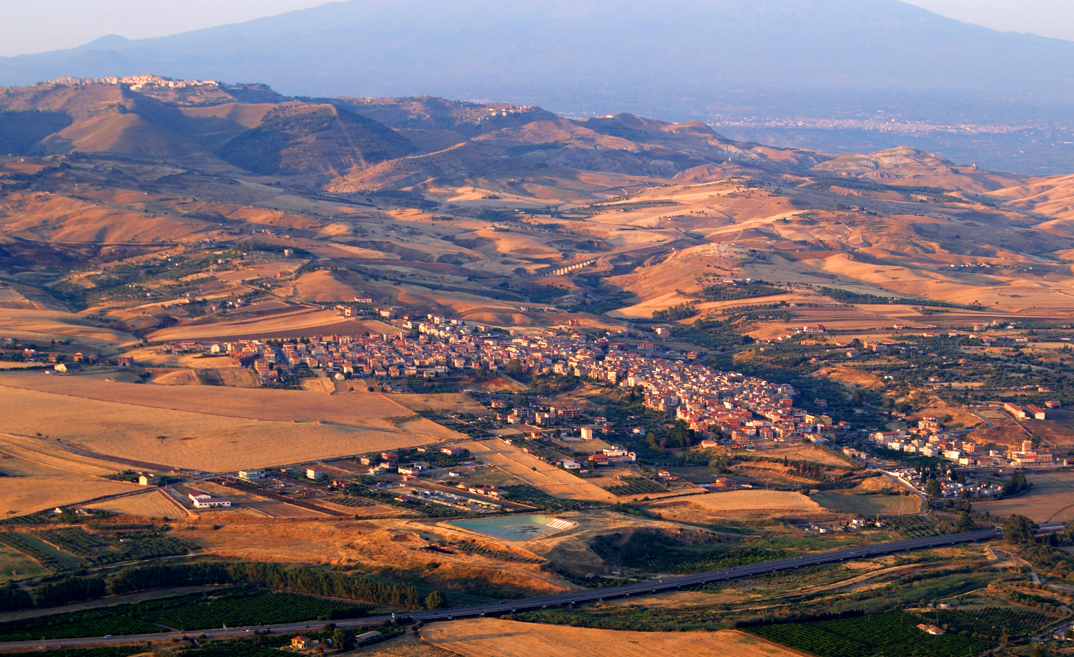 Panorama di Catenanuova visto da monte Scalpello